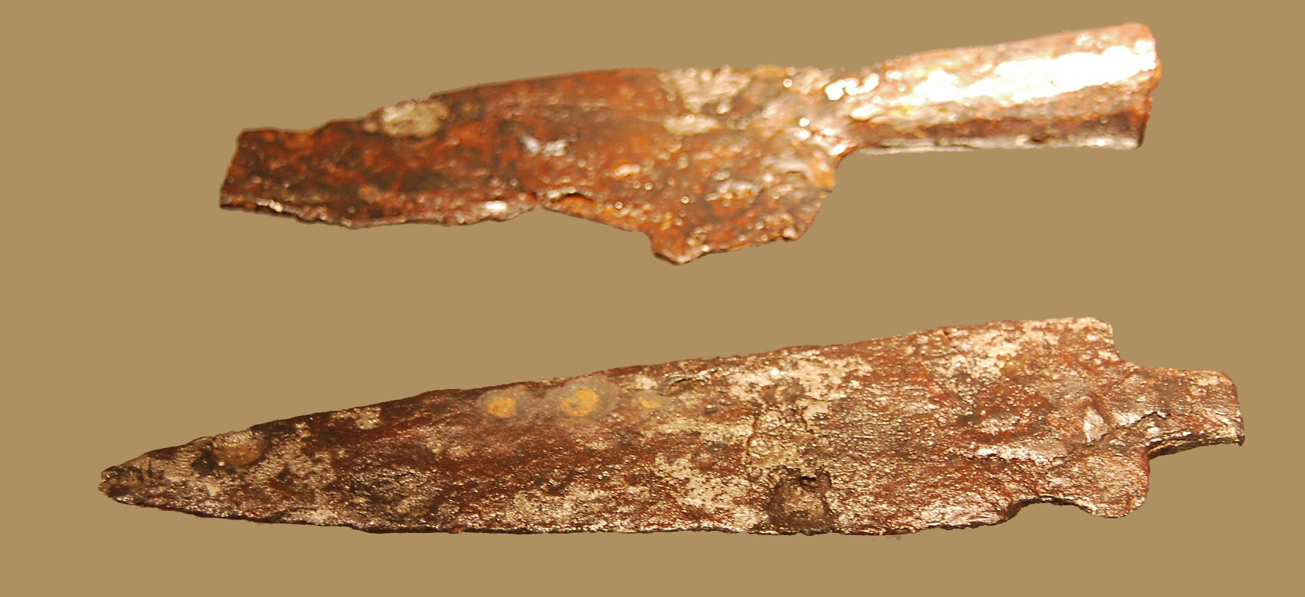 Klingen von Hack- und Schneidemessern aus der römischen Villa bei Brombach, Ausgestellt im Burghof Museum